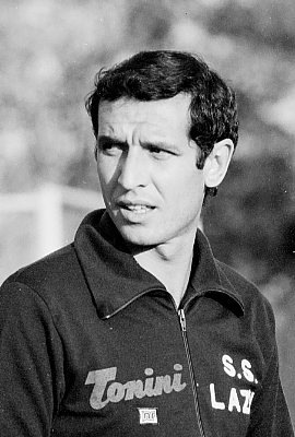 L'ex calciatore italiano Albertino Bigon.